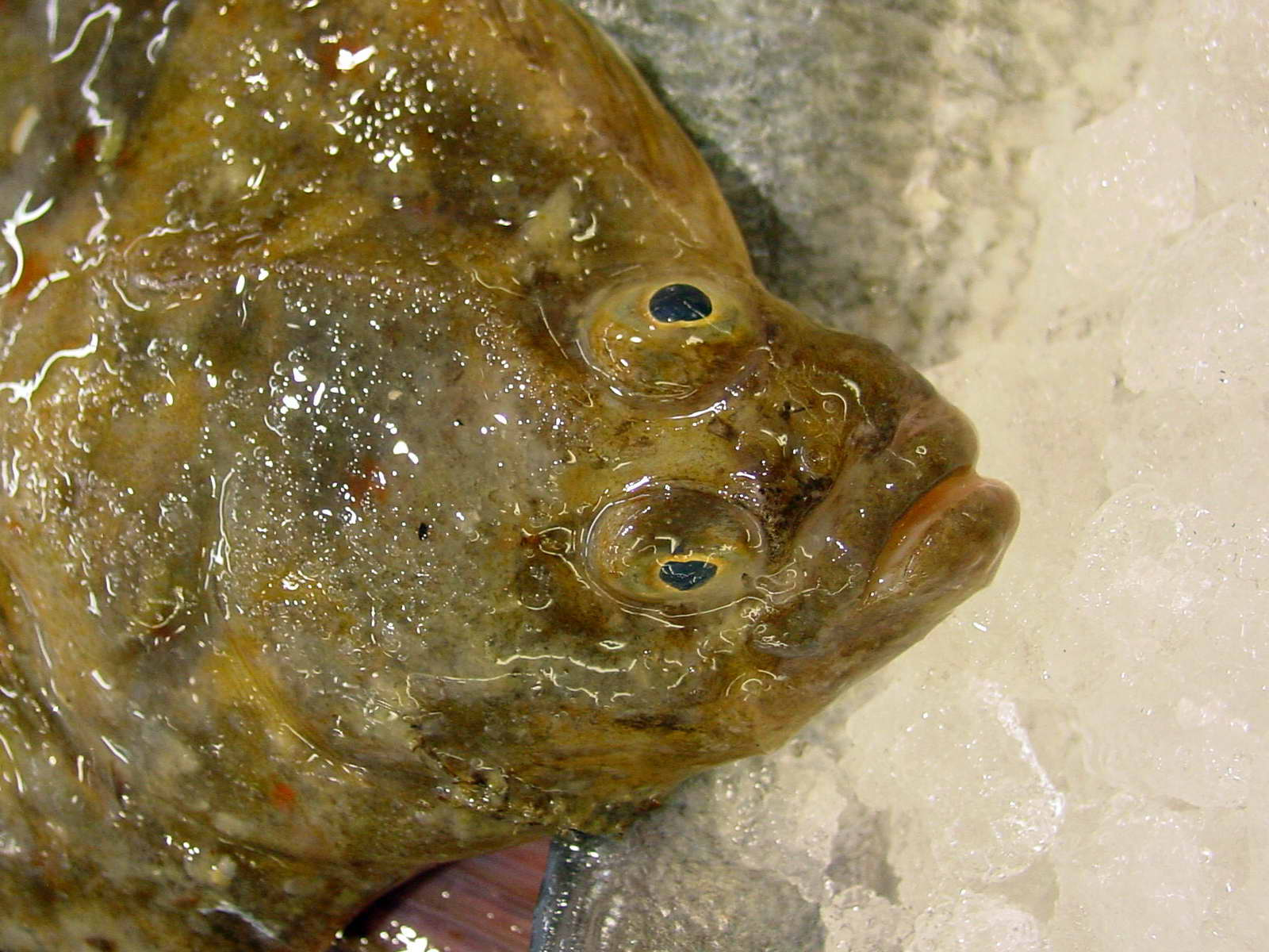 Solla. Platichthys flessus